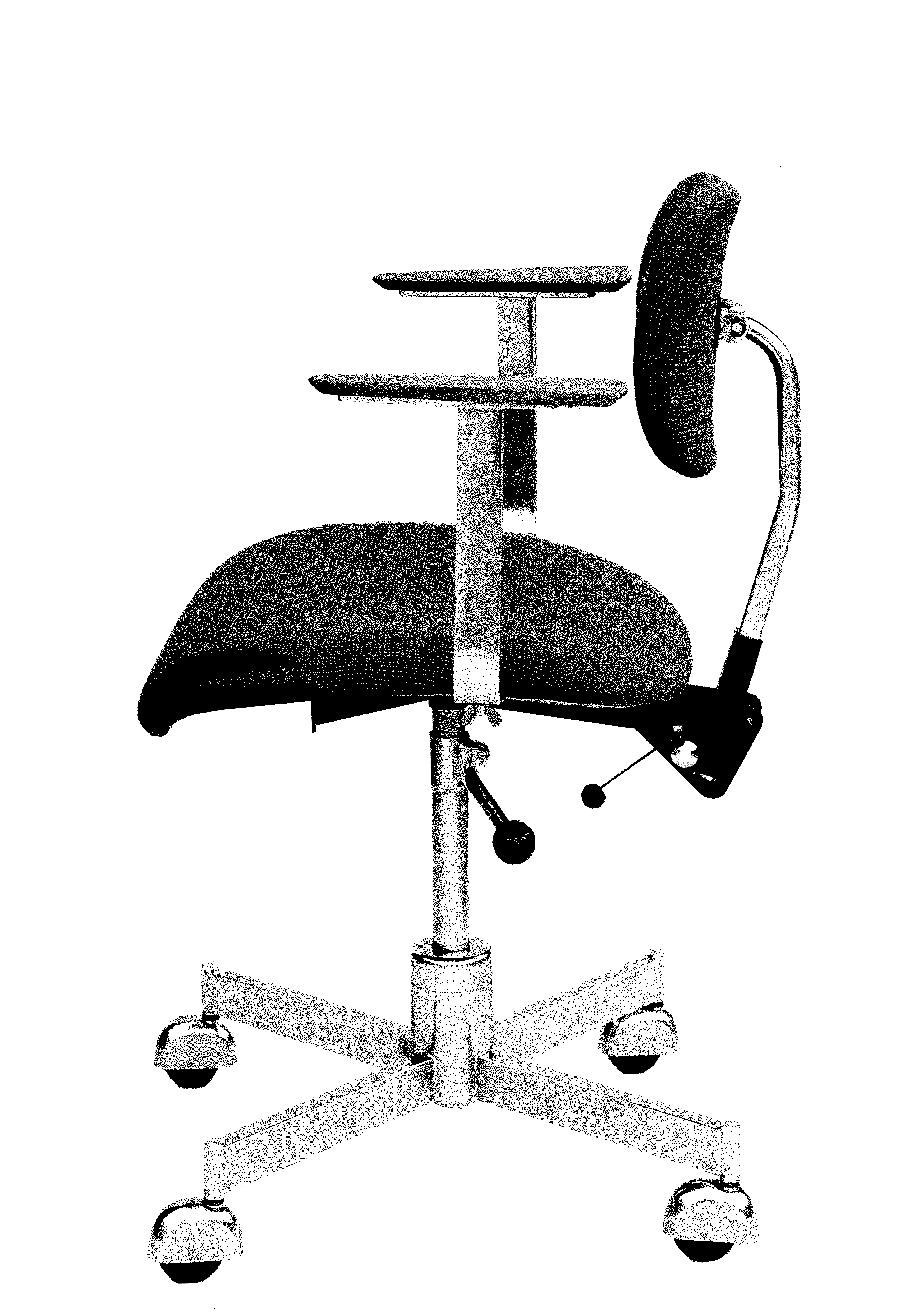 Første stol i verden med højdeindstilling